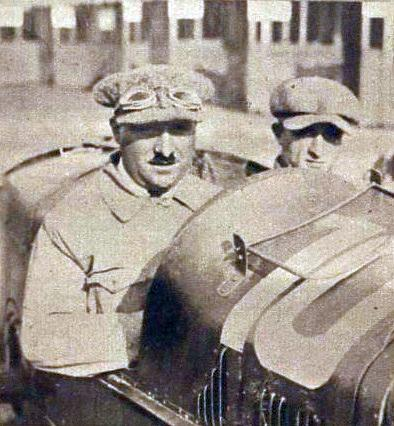 Giuseppe Campari, vainqueur du Grand Prix de France 1924 sur Alfa Romeo P2.